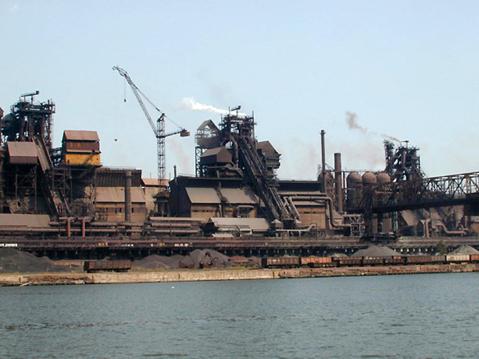 порт комбината "Азовсталь"